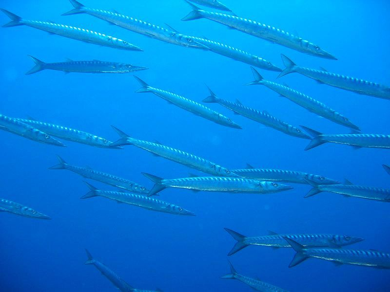 Barrakudaschwarm südlich von Mykonos